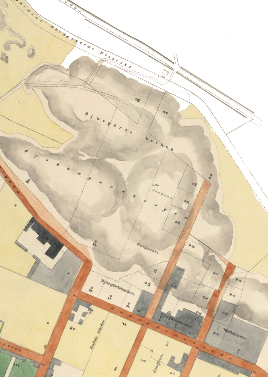 Detalj ur 1863 års Stockholmskarta. Tyskbagarbergen